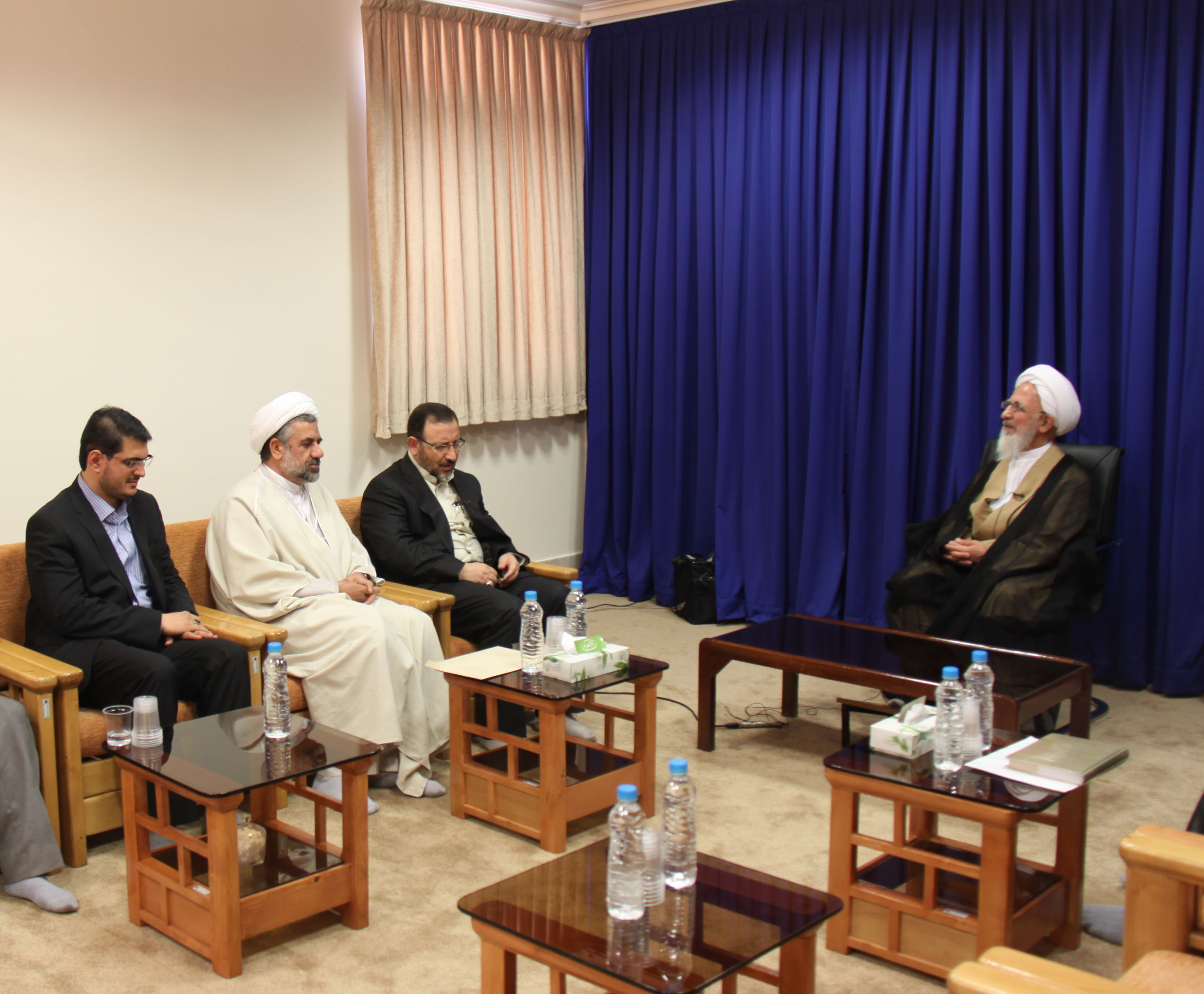 تصویر دیدار کرم رضا پیریایی استاندار وقت قم با آیت الله جوادی آملی در ‌تاریخ 24 مهر 1391. این تصویر عمومی است و در وب‌گاه فردونیوزمنتشر شده است. و تصویر دیگری از آن موجود نیست.